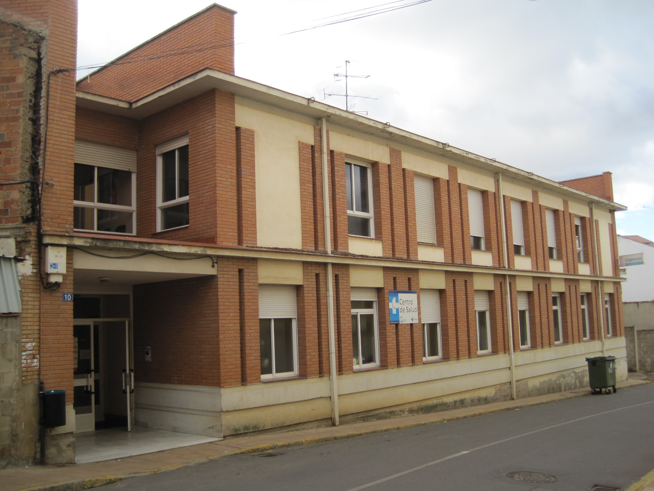 Centro de salud de Sahagún (León, España).